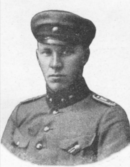 Description